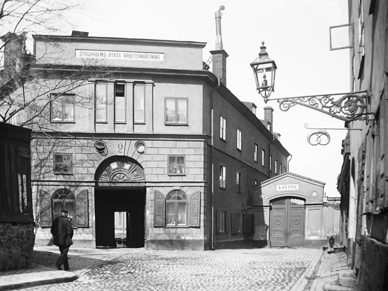 Dihlströmska Arbetsinrättningen för fattiga och arbetslösa. Nytorgsgatan 2, Stora Glasbruksgatan.